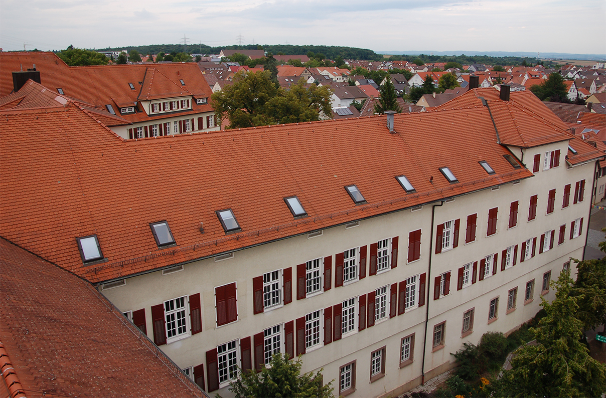 Schloss Grüningen_Südflügel (vom Oberen Tor aus)